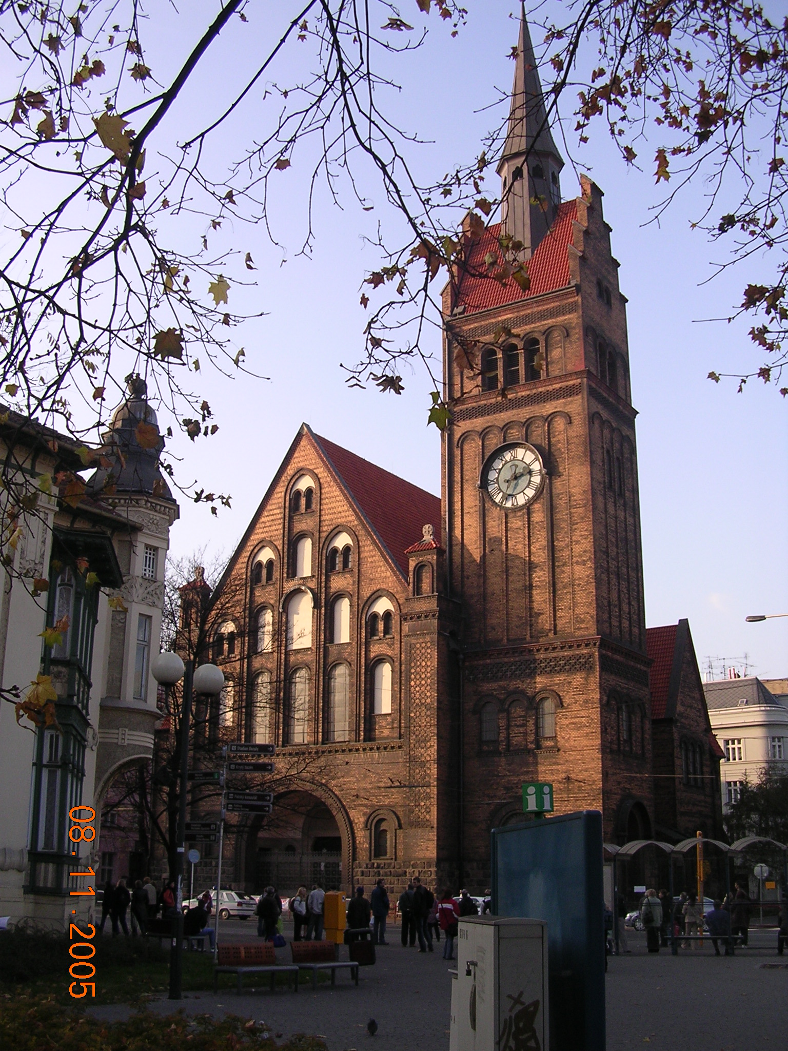 Evangelický kostel